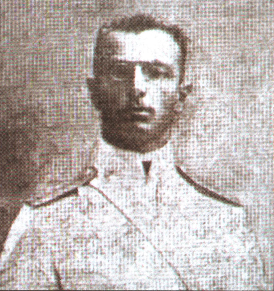 Подпоручик М.Г. Дроздовский. Из журнала "Вестник Галлиполийцев в Болгарии"